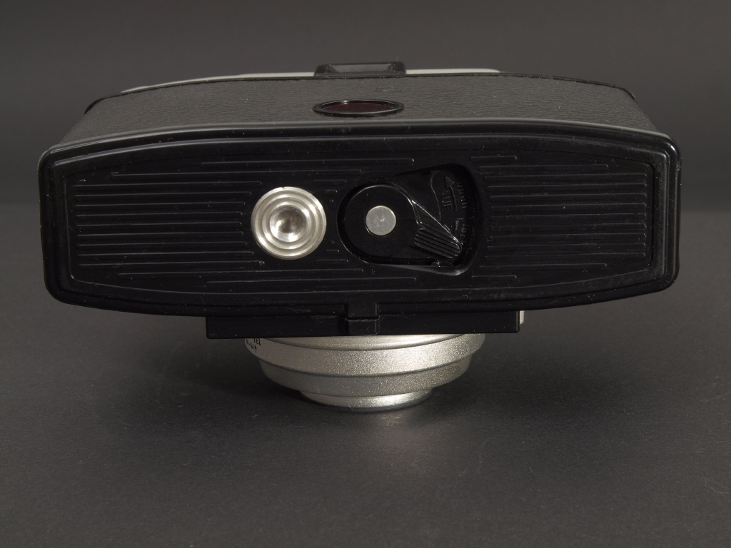 Agfa Isoly Typ 1100. Einfacher Fotoapparat für Rollfime (120) im Format 4x4 cm mit 16 Aufnahmen. Meniskusobjektiv, eine Belichtungszeit 1/30 sec und 2 Blenden 16 und 11, keine Entfernungseinstellung, jedoch „Nahaufnahmen“ 2,5m -5m über eine einschwenkbare Linse, Filmtransport und Spannen des Verschlusses mit Auslösung getrennt. Um Doppelbelichtungen zu vermeiden Kontrollfenster neben dem Filmtransportrad. Zubehörschuh mit Mittenkontakt!